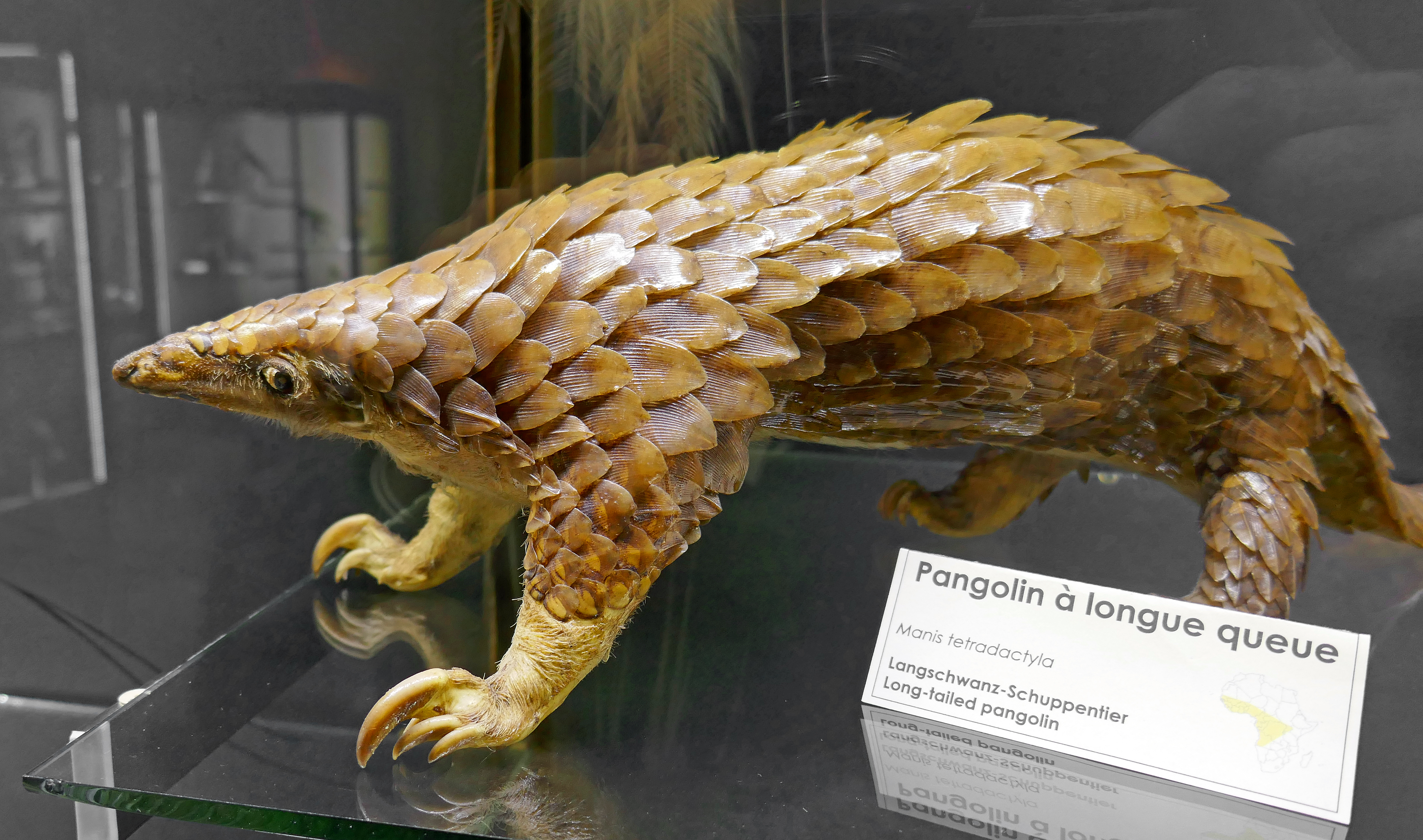 Pangolin à longue queue (Manis tetradactyla) naturalisé, au Musée d'histoire naturelle et d'ethnographie de Colmar.